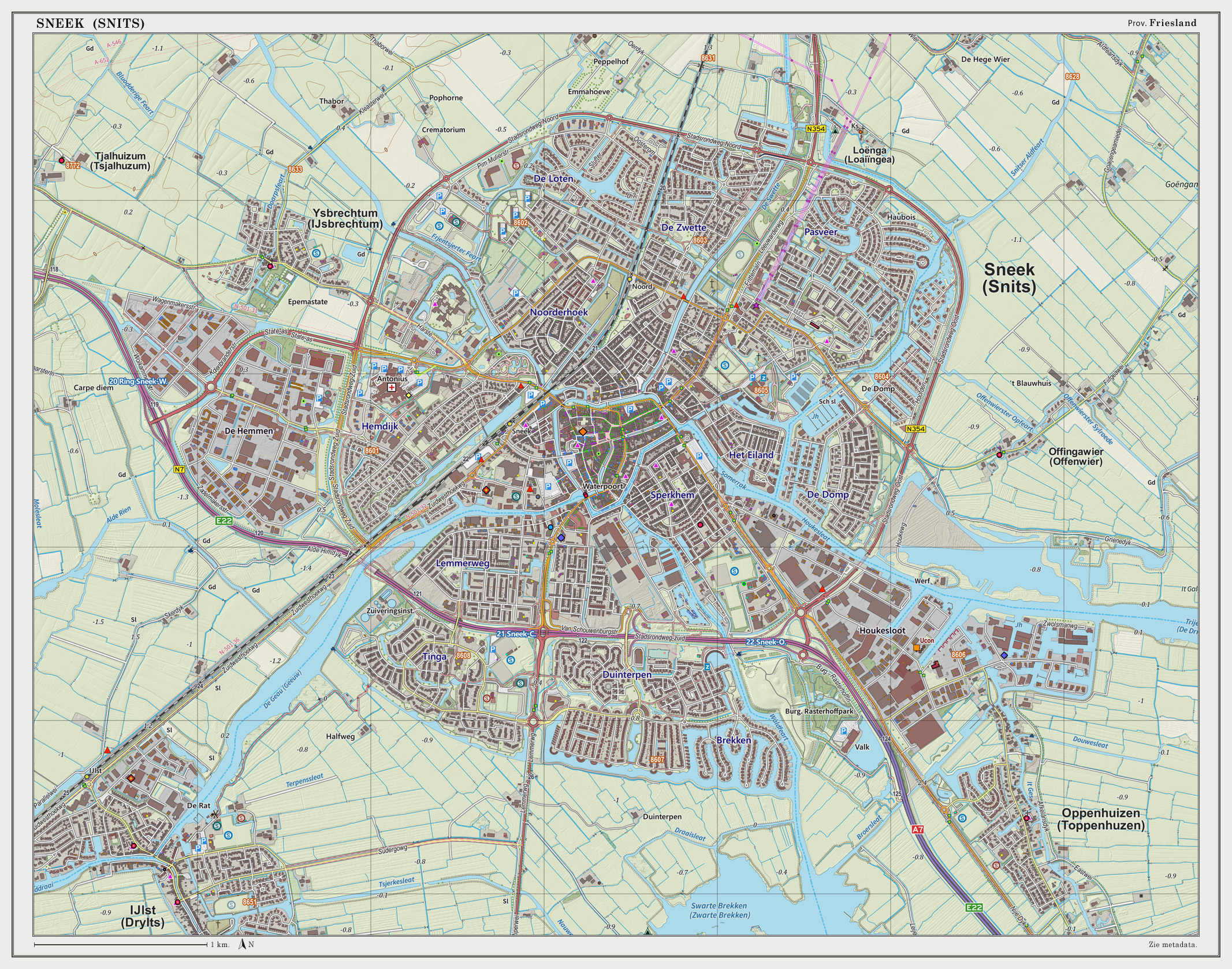 Topografische kaart van Sneek (woonplaats). Resolutie: 300 pixels/km. Kaartbeeld samengesteld uit de open geodata van de Top10NL en Top25namen (Basisregistratie Topografie, Kadaster), Creative Commons BY licentie. Gebouwvlakken uit open geodata BAG extract. Wegen uit de OpenStreetMap. Reliëfschaduw uit de Actuele Hoogtekaart AHN2. Samenstelling en kleurenschema: Jan-Willem van Aalst, met QGIS2. Zie ook de Legenda.